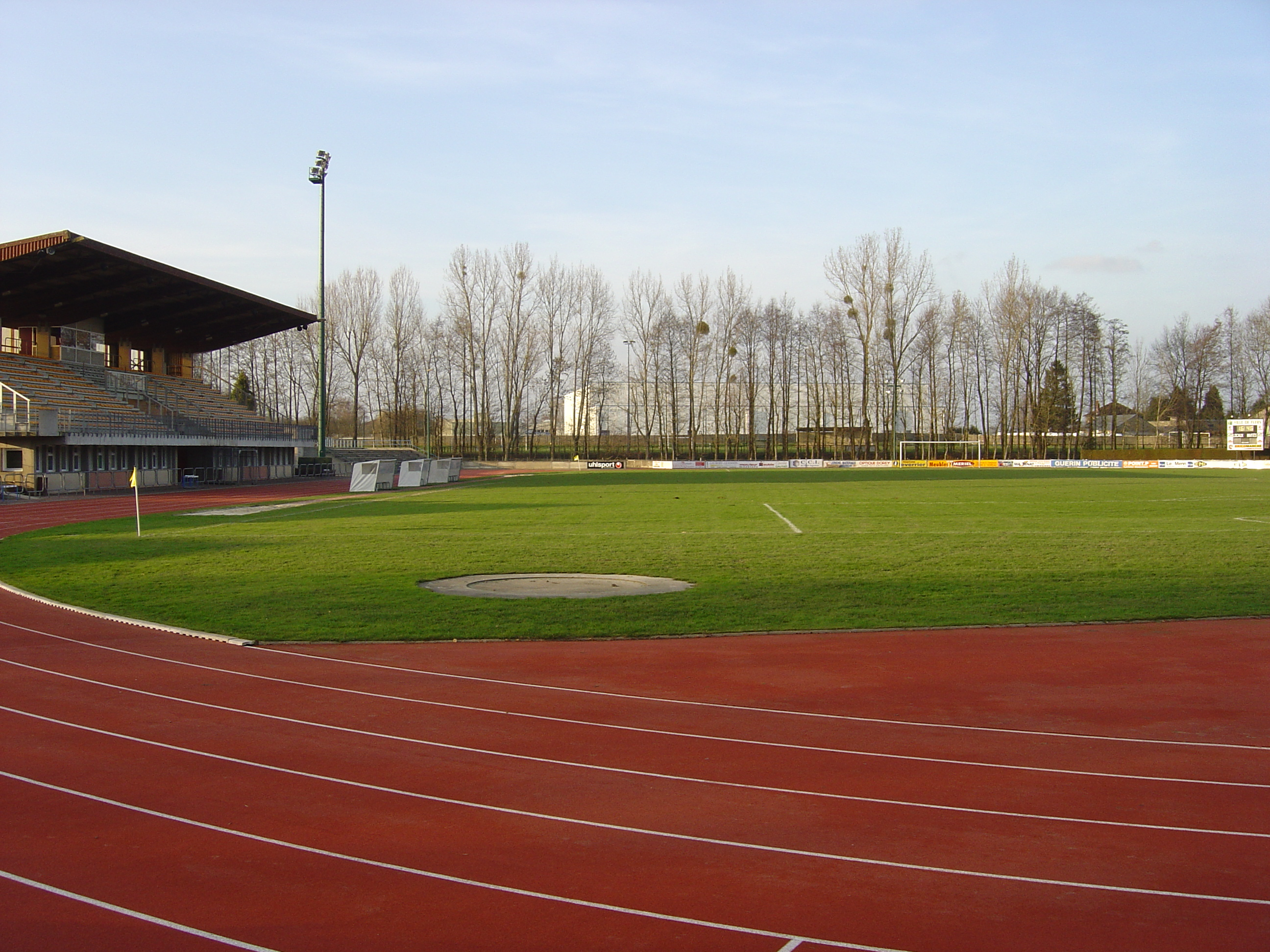 Photo du Stade du Hazé de Flers de l'Orne prise le 04/02/07.